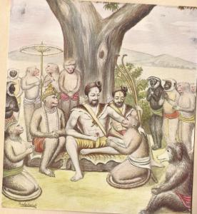 Chitra Ramayana (Illustrated Ramayana) is a simplified story of the great Indian epic in Kannada. The type is bold and beautiful. The thick pages have become brittle and need careful handling. Printed by B. Miller, Superintendent, British India, Press, Mazgaon, Bombay. It was published by, Shrimat Balasaheb Pandit Pant Pratinidhi, chief of Aundh, at Aundh, Satara district. The Kannada version is by Ramachandra Madhwa Mahishi The date shown is 1916. It is all the more important because the book contains illustrations painted by the publisher also called Bhavan Rao Shrinivas Rao, the ruler of the state of Aundh himself.